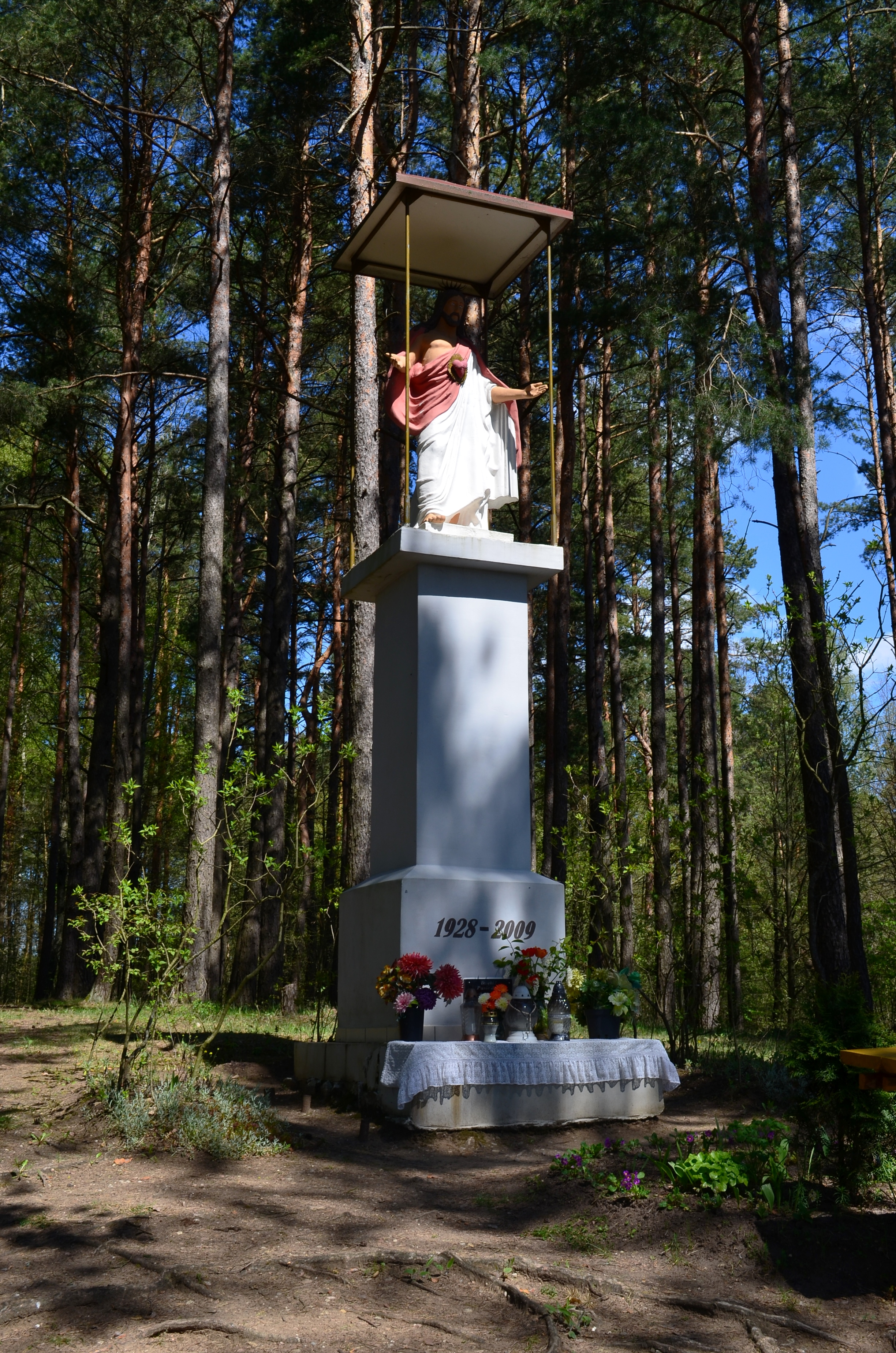 Kristaus paminklas ant Staviškių piliakalnio, Verkių sen., Vilnius